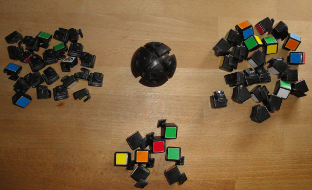 Alle Teile des Rubiks Revenge